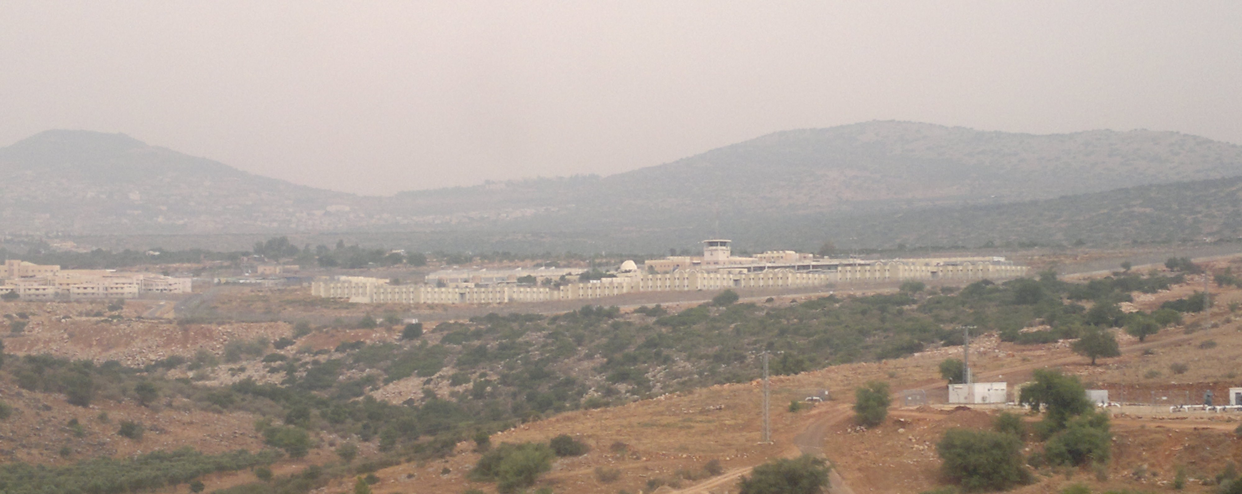 כלא צלמון